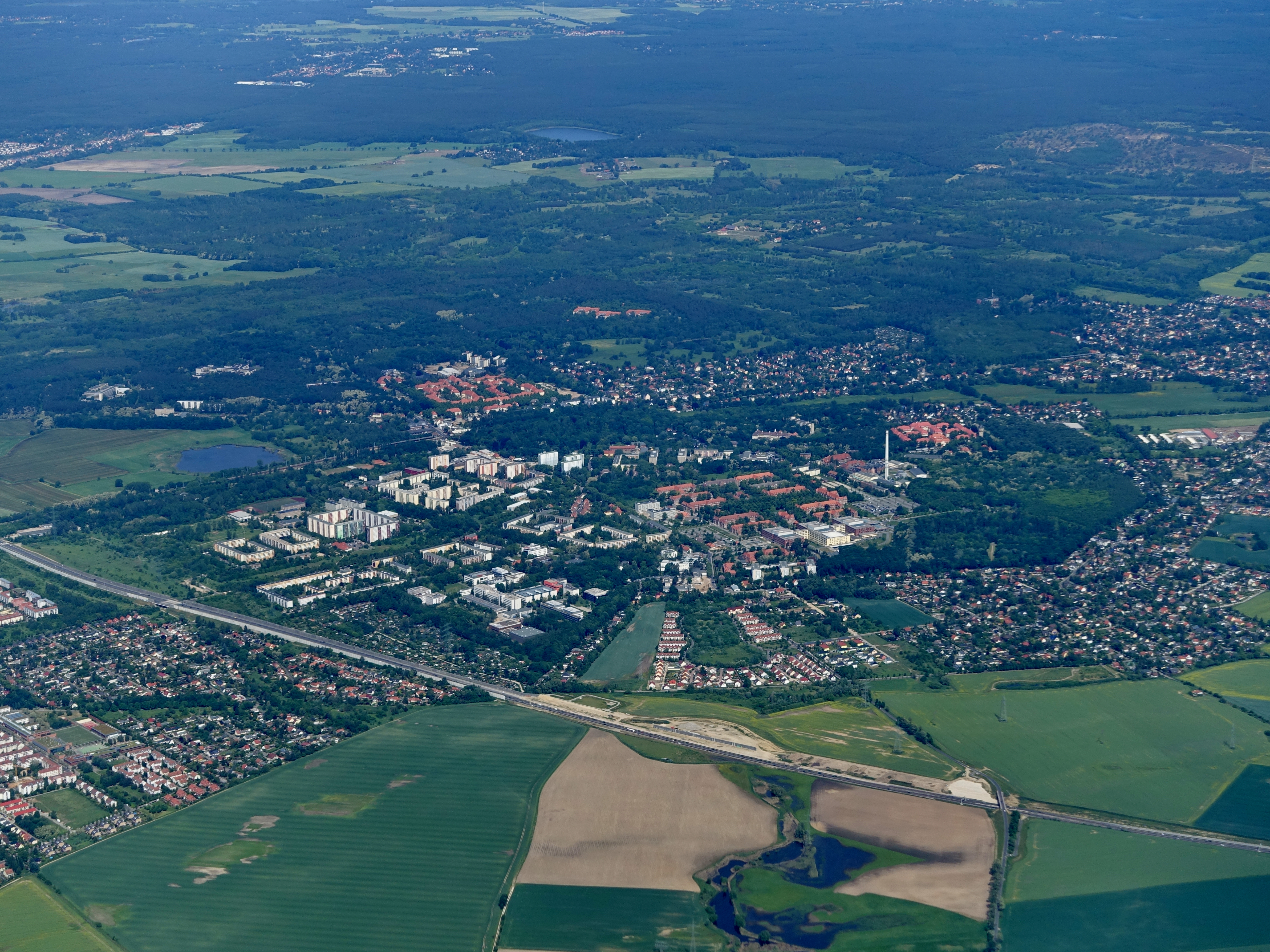 Ortsteil Buch des Berliner Bezirkes Pankow, Berlin, Deutschland